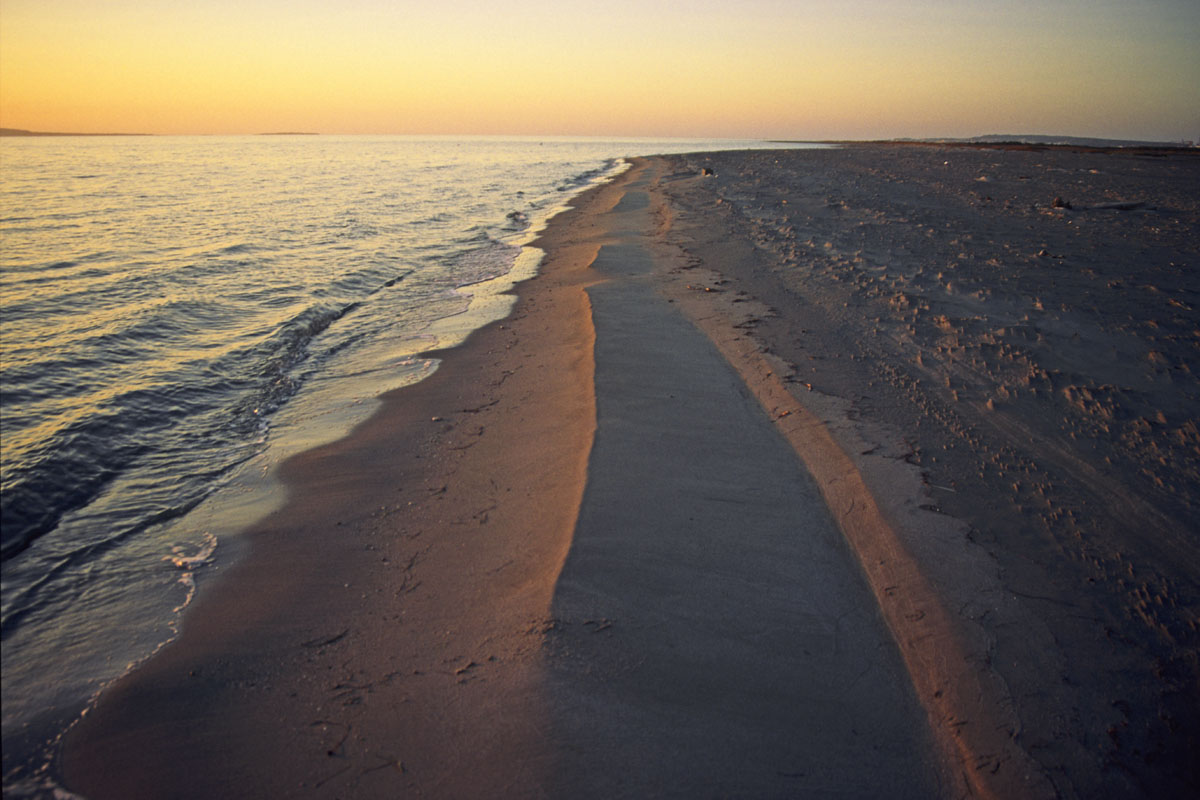 Portoscuso-Paringianu. Spiaggia di Sa Punta 'e S'Aliga